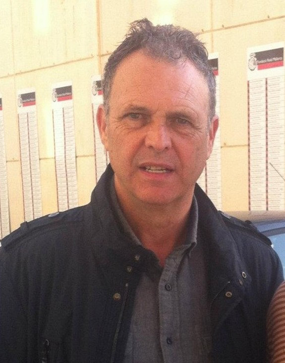 Joaquín Caparrós, entrenador de fútbol español